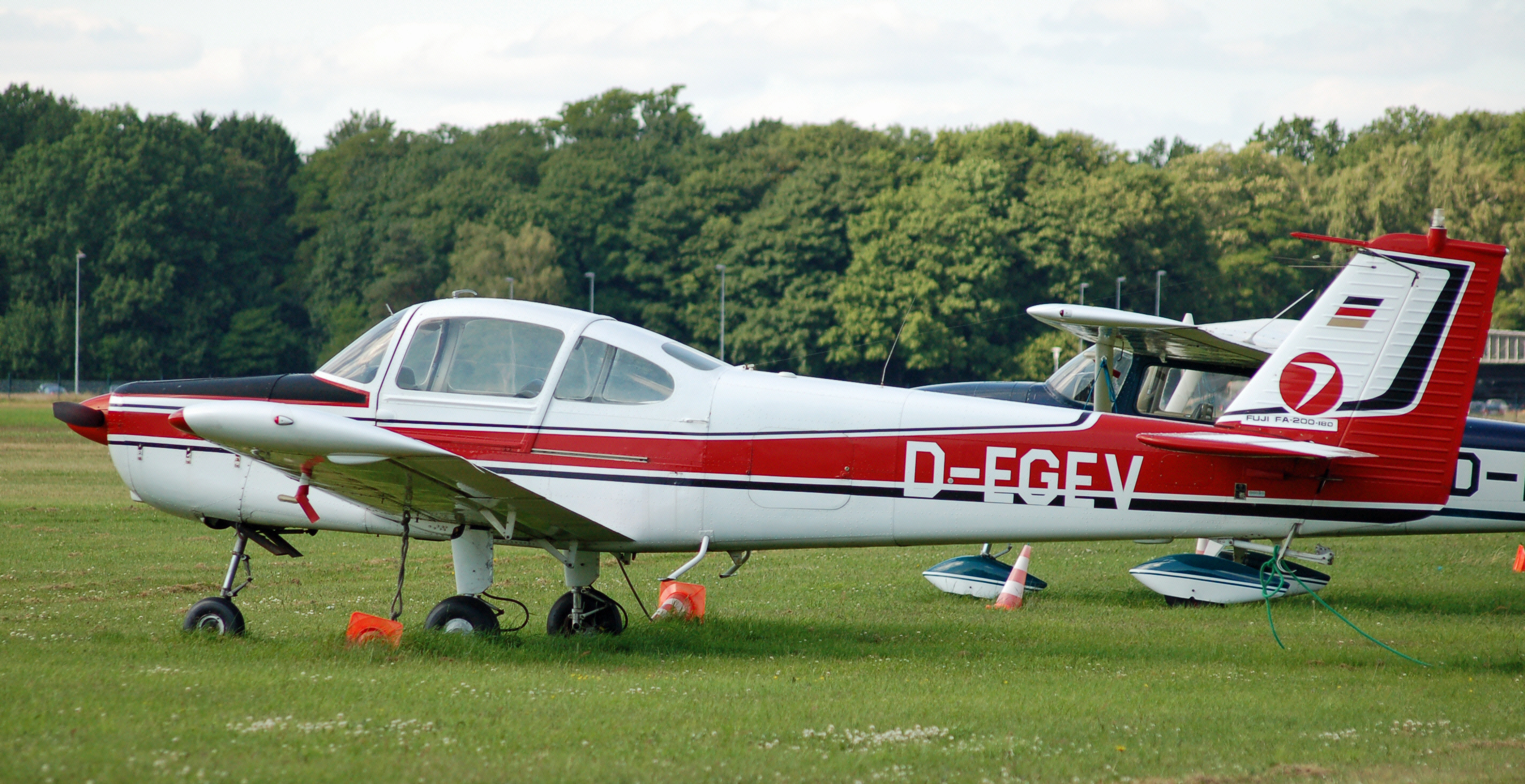 Fuji FA200-180 (D-EGEV) auf dem Flugplatz Uetersen